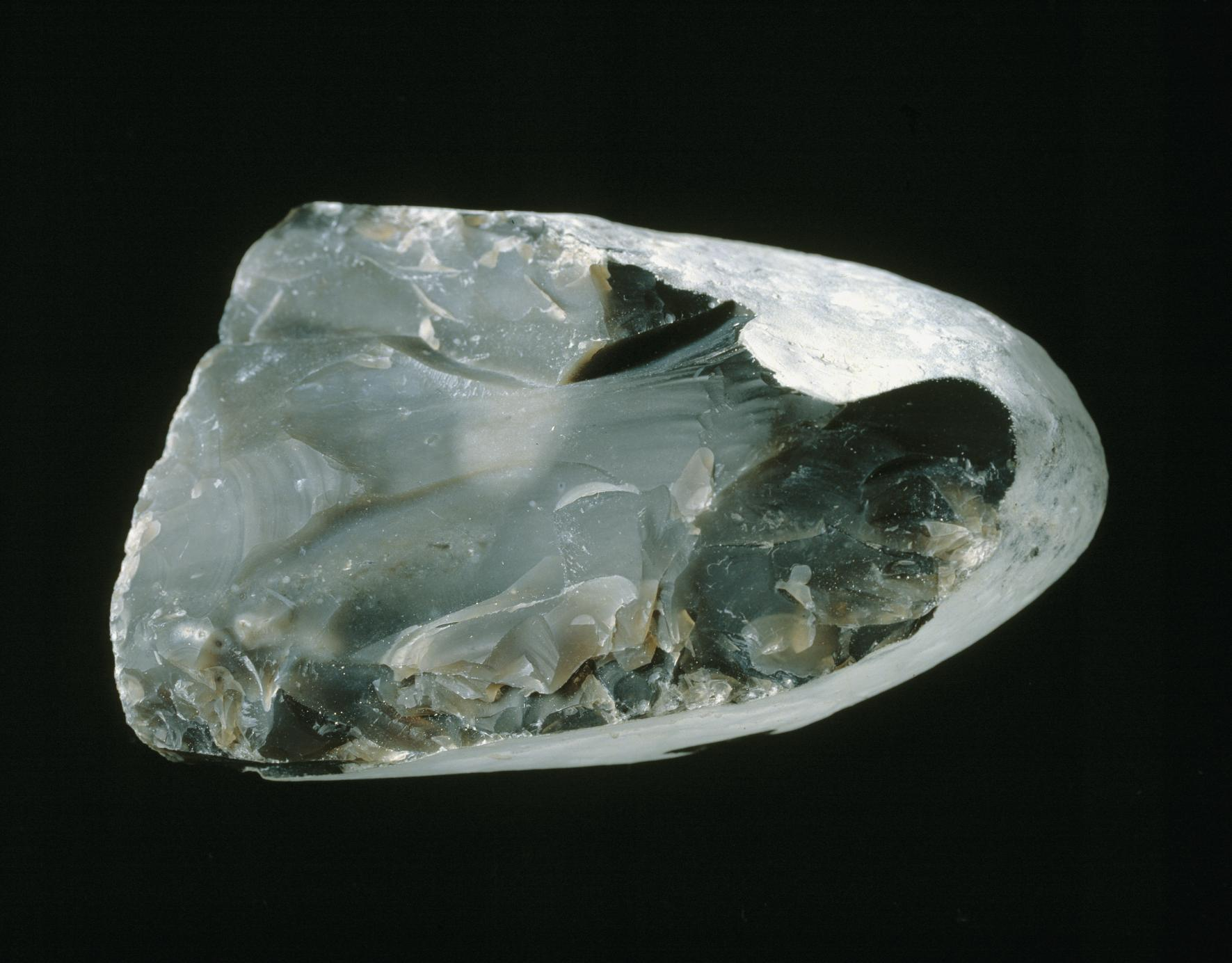 Photo: Anders Damberg Skånes landskapssten, flinta, består av mineralen kalcedon och opal som är kiseldioxid precis som kvarts men har annan kristallstruktur. Flintan är nästan glasig och har ett mussligt brott. Den förekommer i många olika färger men i södra Skandinavien är den ofta blå, svart eller mörkbrun. I Skåne bildar flintan bollar och oregelbundet formade klumpar i kritkalksten med en ålder på mellan 50 och 100 miljoner år. Flinta är den sten som först kom att brytas av människor i vårt land. Dess skärvor är vassa som rakblad och användes under stenåldern till verktyg som knivar och pilspetsar. Flintan är dock spröd, vilket gör att bitar lätt bryts loss och ett verktyg snabbt blir slött. Flinta kan också användas för att starta en eld. När man slår mot flinta med ett eldstål (härdat kolrikt stål använt sedan folkvandringstiden till mitten av 1800-talet i Norden) uppstår gnistor som kan fångas med fnöske.